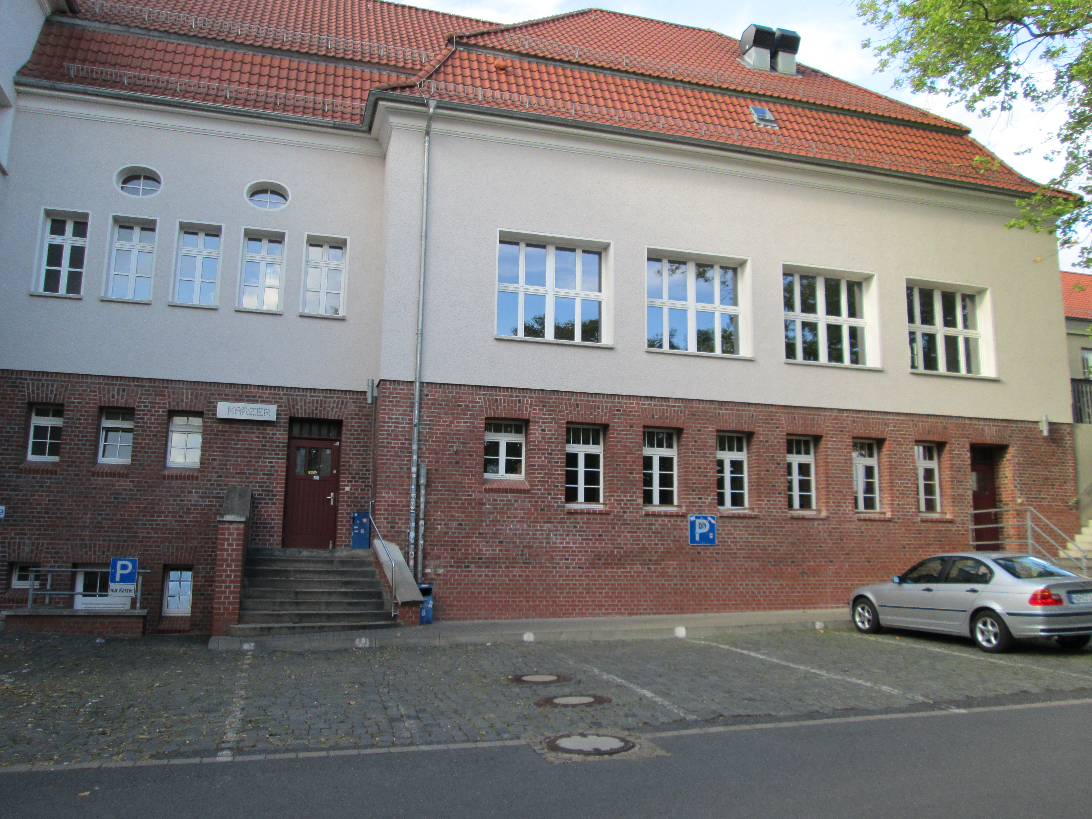 Hochschule Nordhausen, Studentenclub "KARZER", Gebäude 9